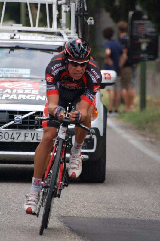 Rigoberto Uran con el Caisse d'Epargne en el Giro de Italia 2010